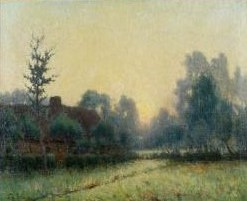 Franz Callabaut, coucher du soleil